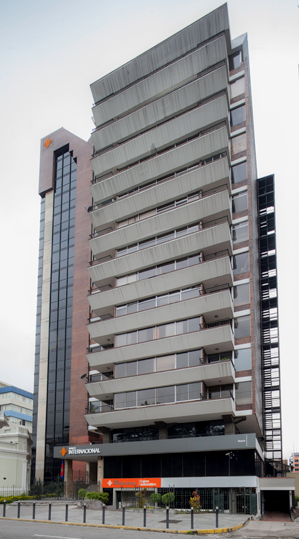 Esta es la agencia matriz del Banco Internacional, ubicada en Av. Patria E4-21 y Av. 9 de Octubre